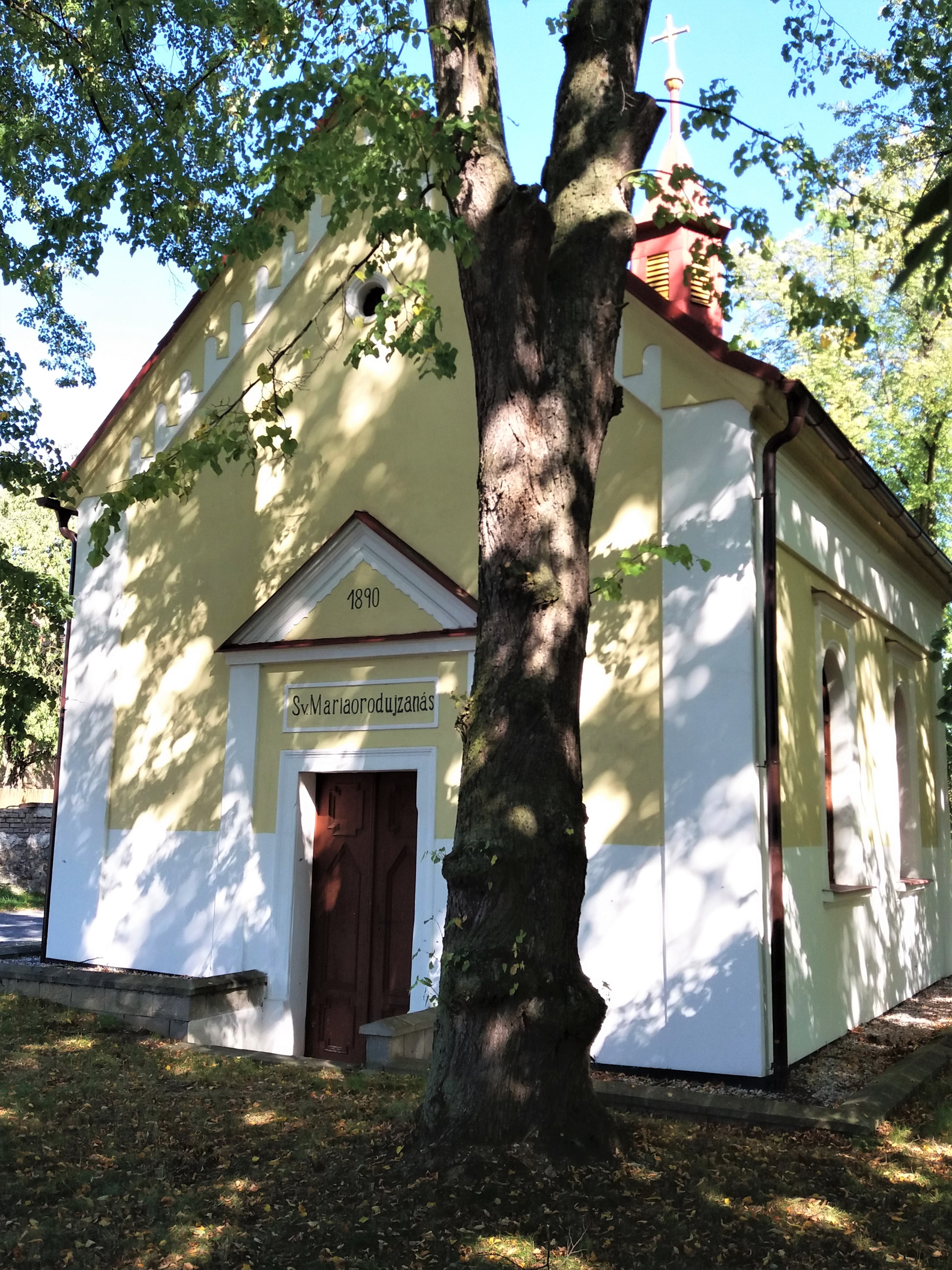 Větší kaple uprostřed vsi